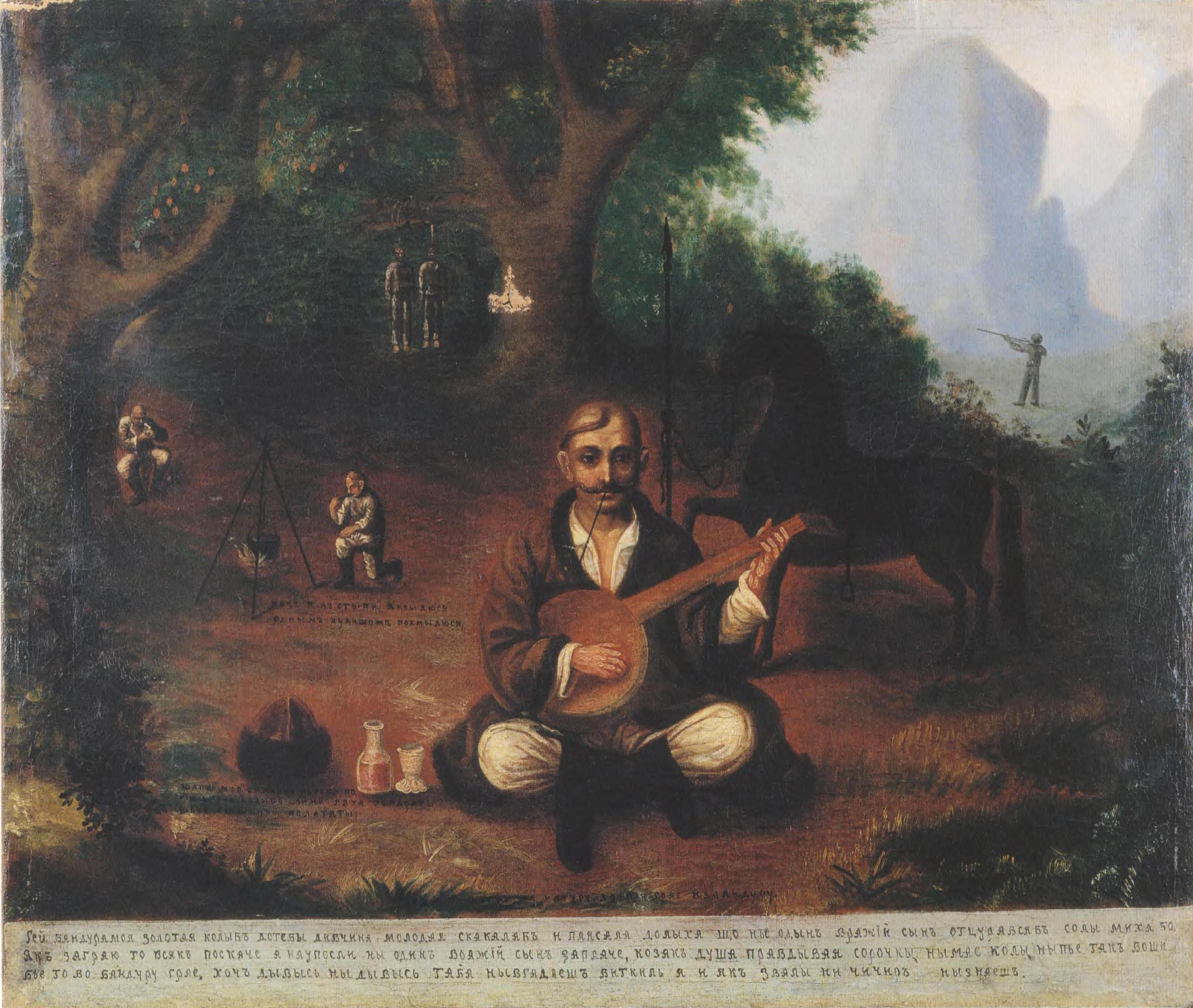 Козак Мамай, XVIII ст. Походження невідоме. Полотно, олія, 72 х 85. Дніпровський історичний музей ім. Д. І. Яворницького. Напис під зображенням: “Гей бандура моя золотая колыбъ дотебы дивчина молодая скакала бъ и плясала долыха що ны одынъ вражій сынъ отцурався бъ солы миха. Якъ загряю то всякъ колы бъ поскаче а наупосли ны одинъ вражій сынъ заплаче, козакъ душа правдывая сорочкы нымае колы ны пье такъ воши бье то во бандуру грае, хочъ дывысь ны дывысь табя нывгадаешъ виткиль а и якъ звалы ни чичиръ нызнаешъ.""